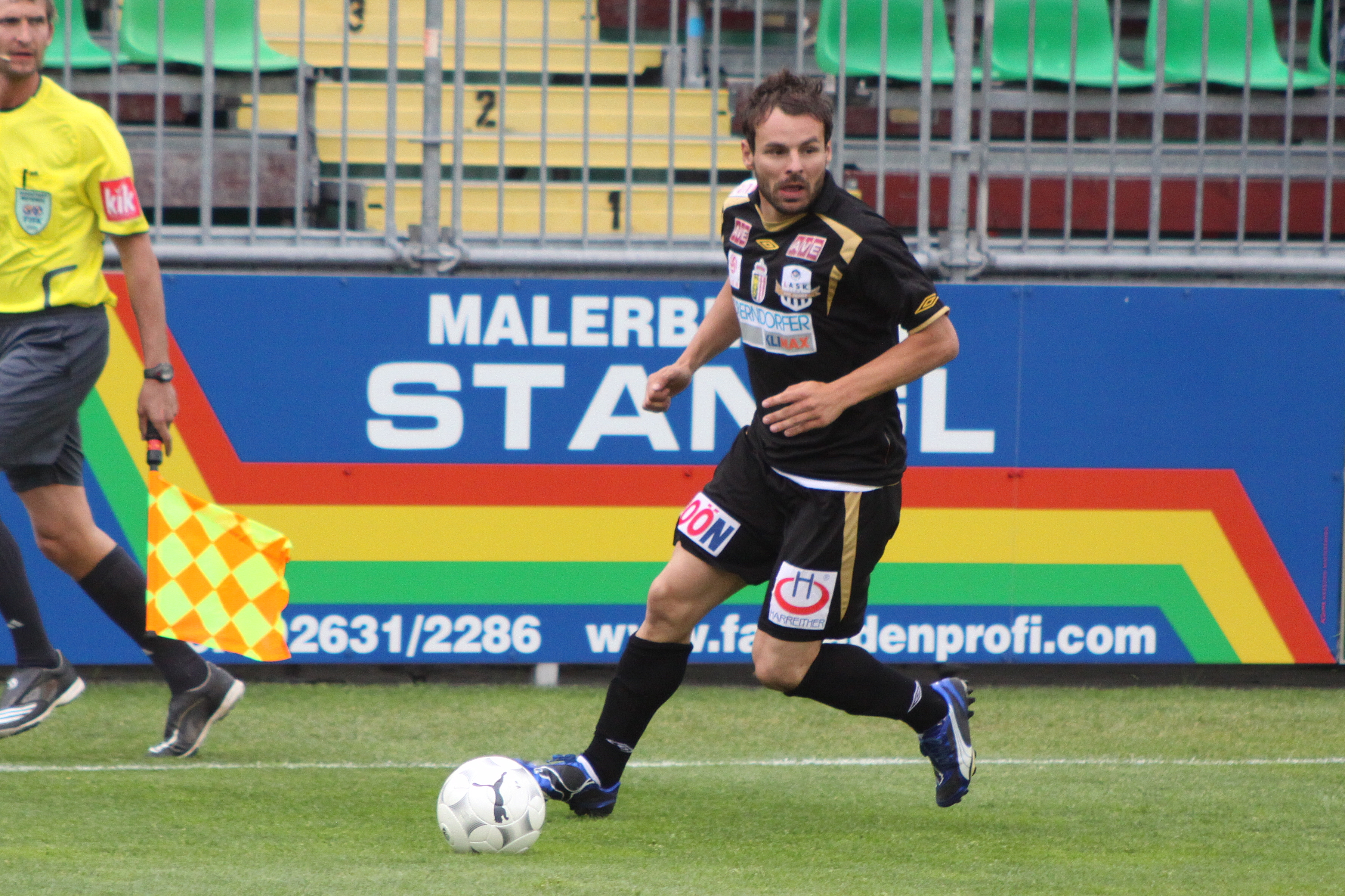 Roman Wallner (österreichischer Fußballspieler in Diensten des LASK Linz) in Aktion